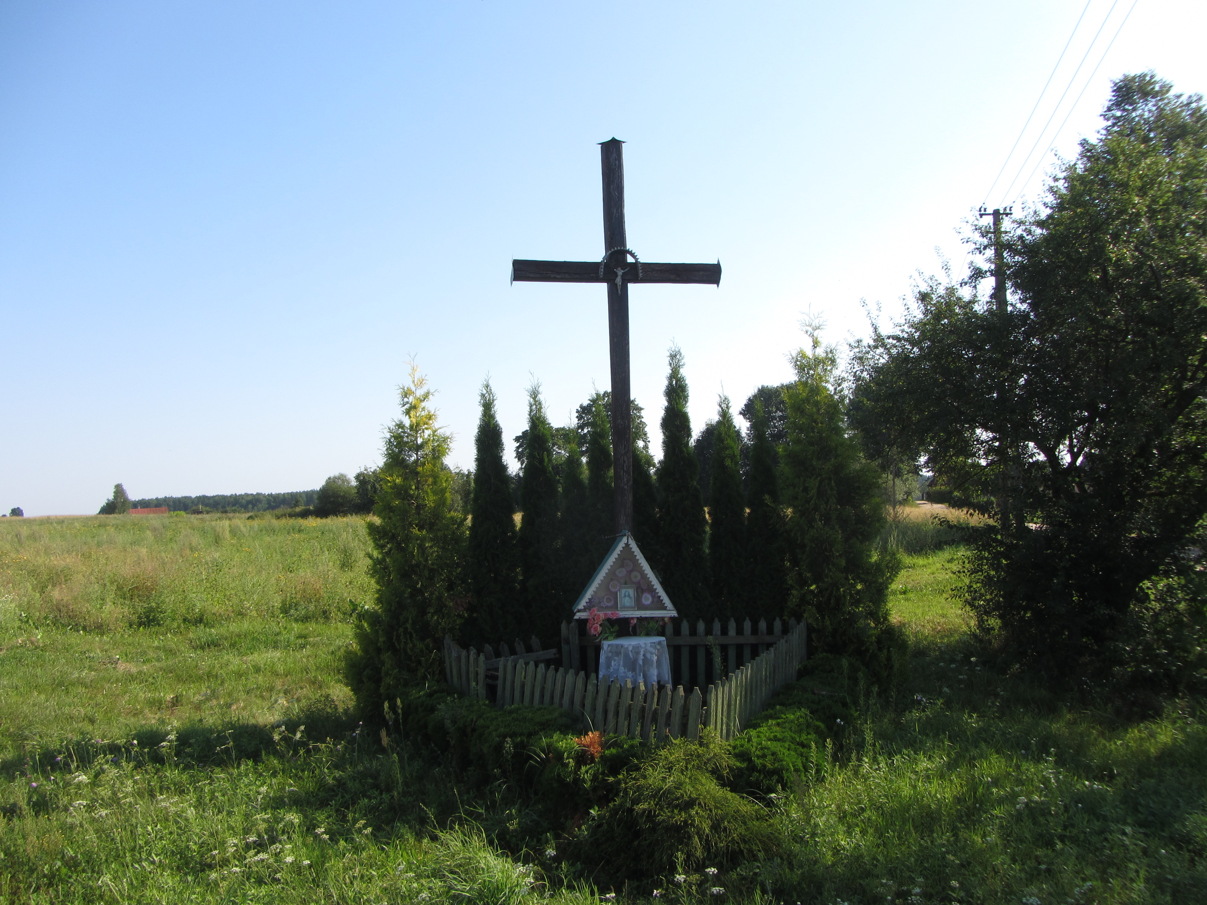 Ašmenėlė 13176, Lithuania